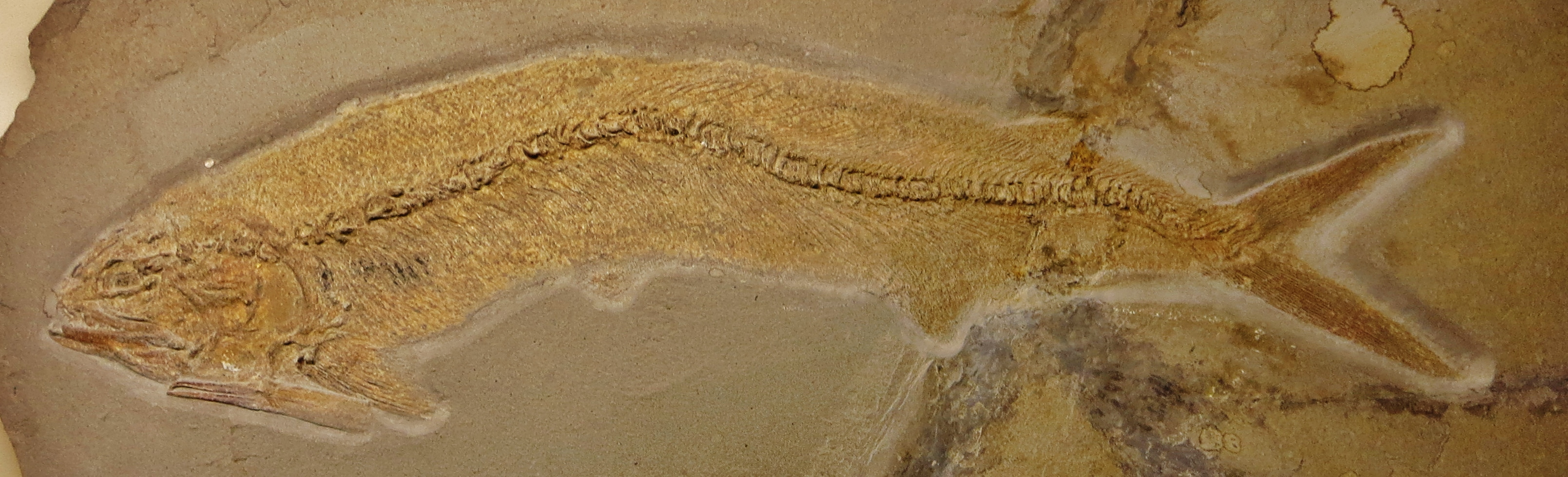 Took the picture at Jura-Museum, Eichstaett